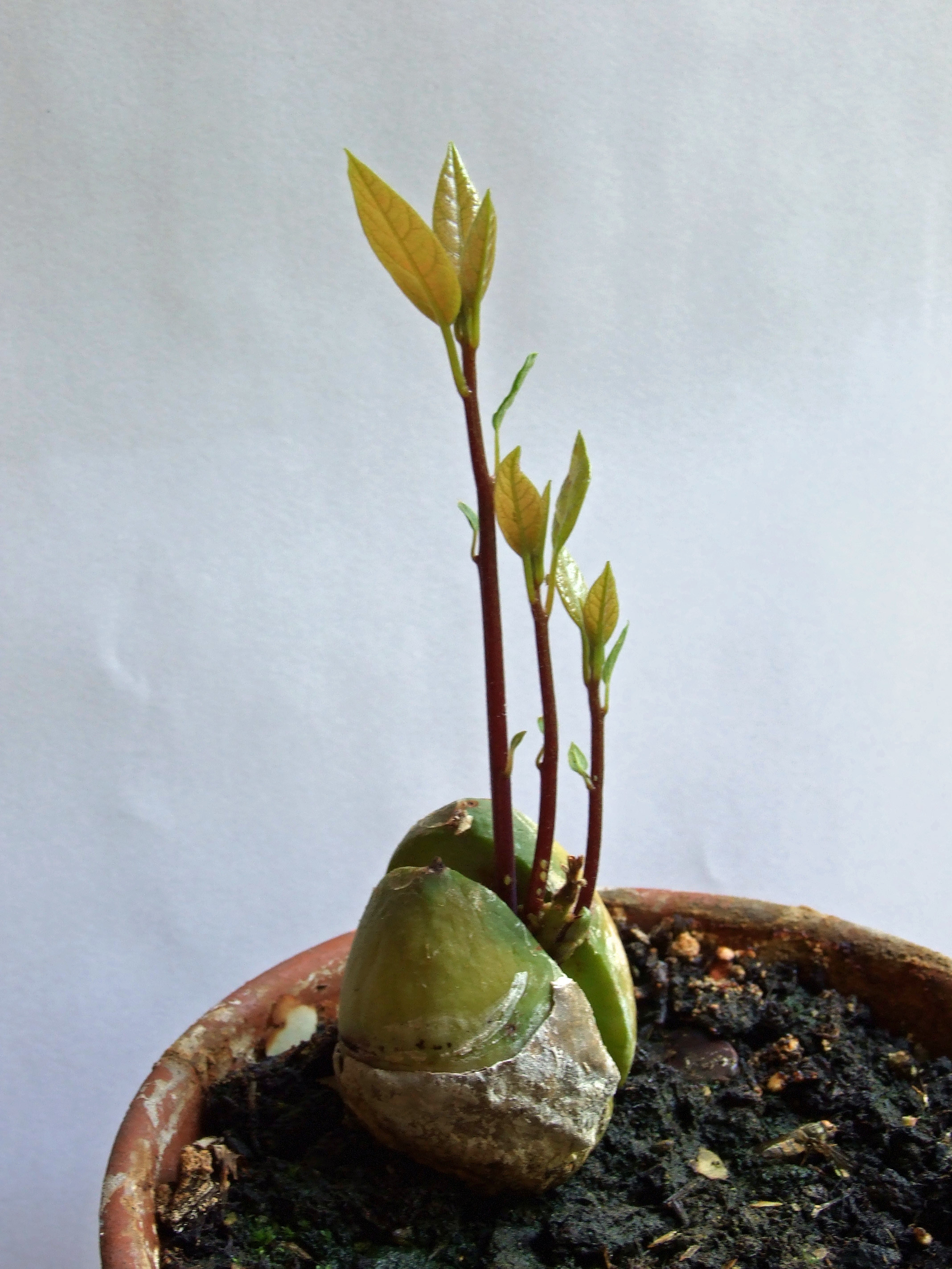 Avocadopflanze